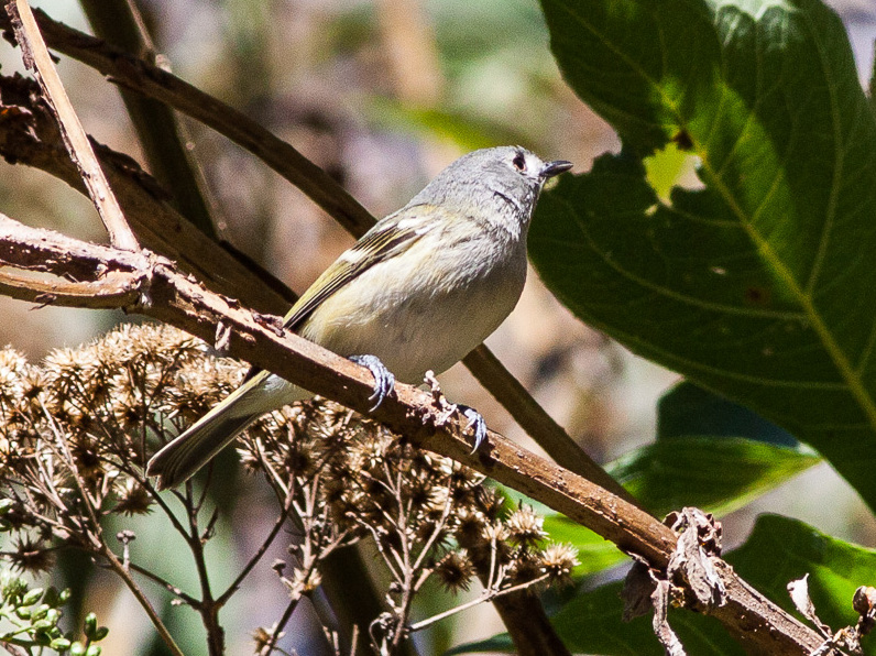 Volcan de Fuego, Colima